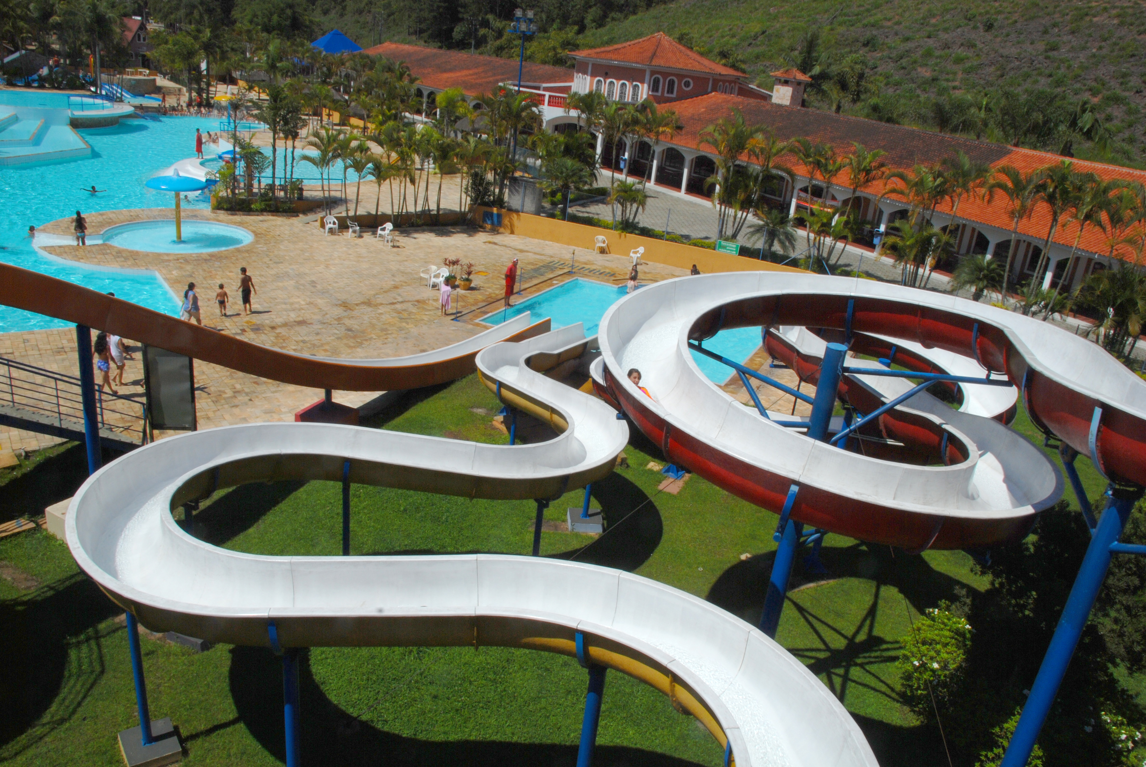 Foto aérea do Toboágua.